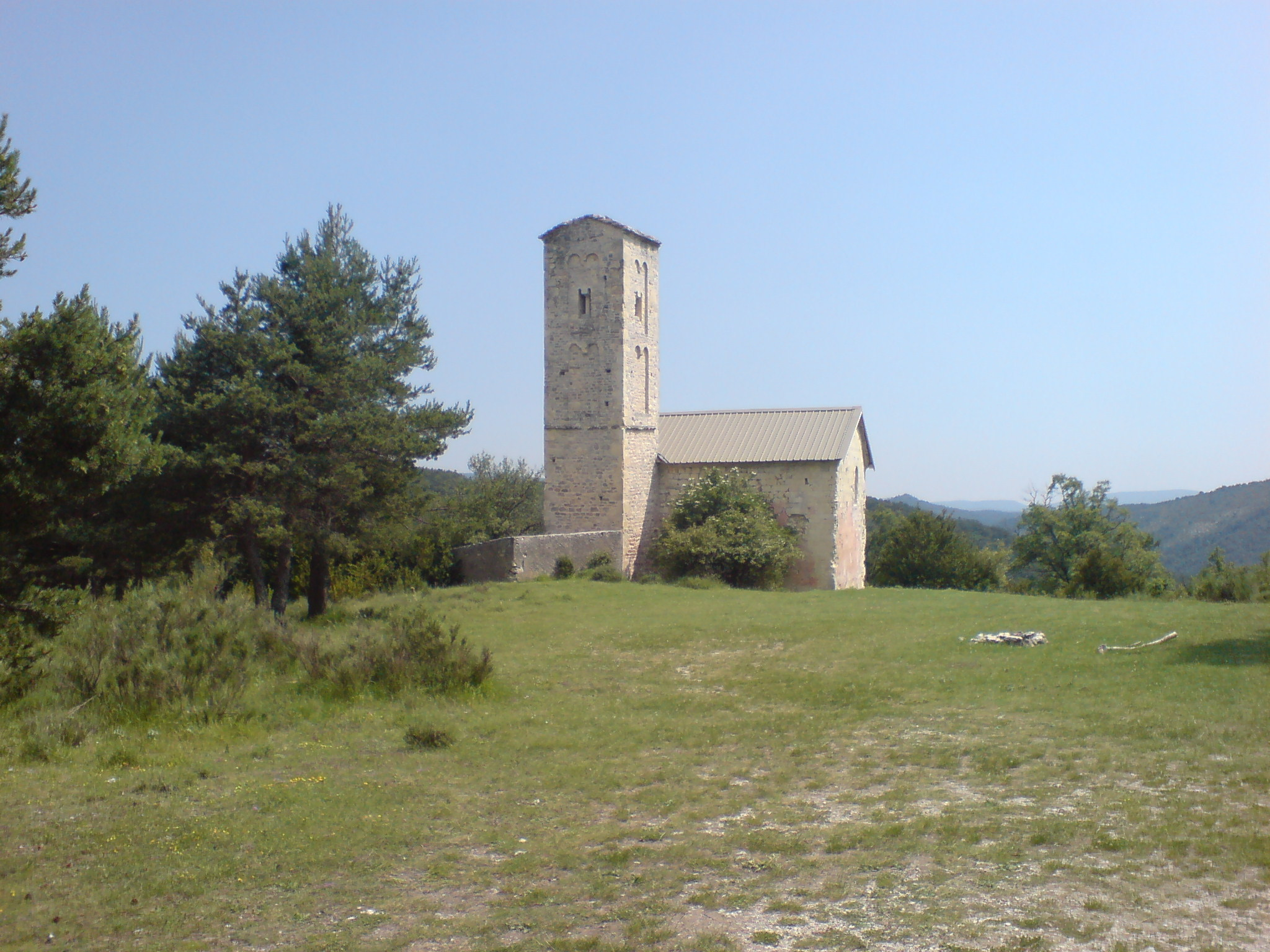 Chapelle romane Saint-Thyrse ; commune de Castellane, France ; art roman, XIIe siècle